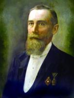 Adolf Heinrich Posselt - dobový portrét